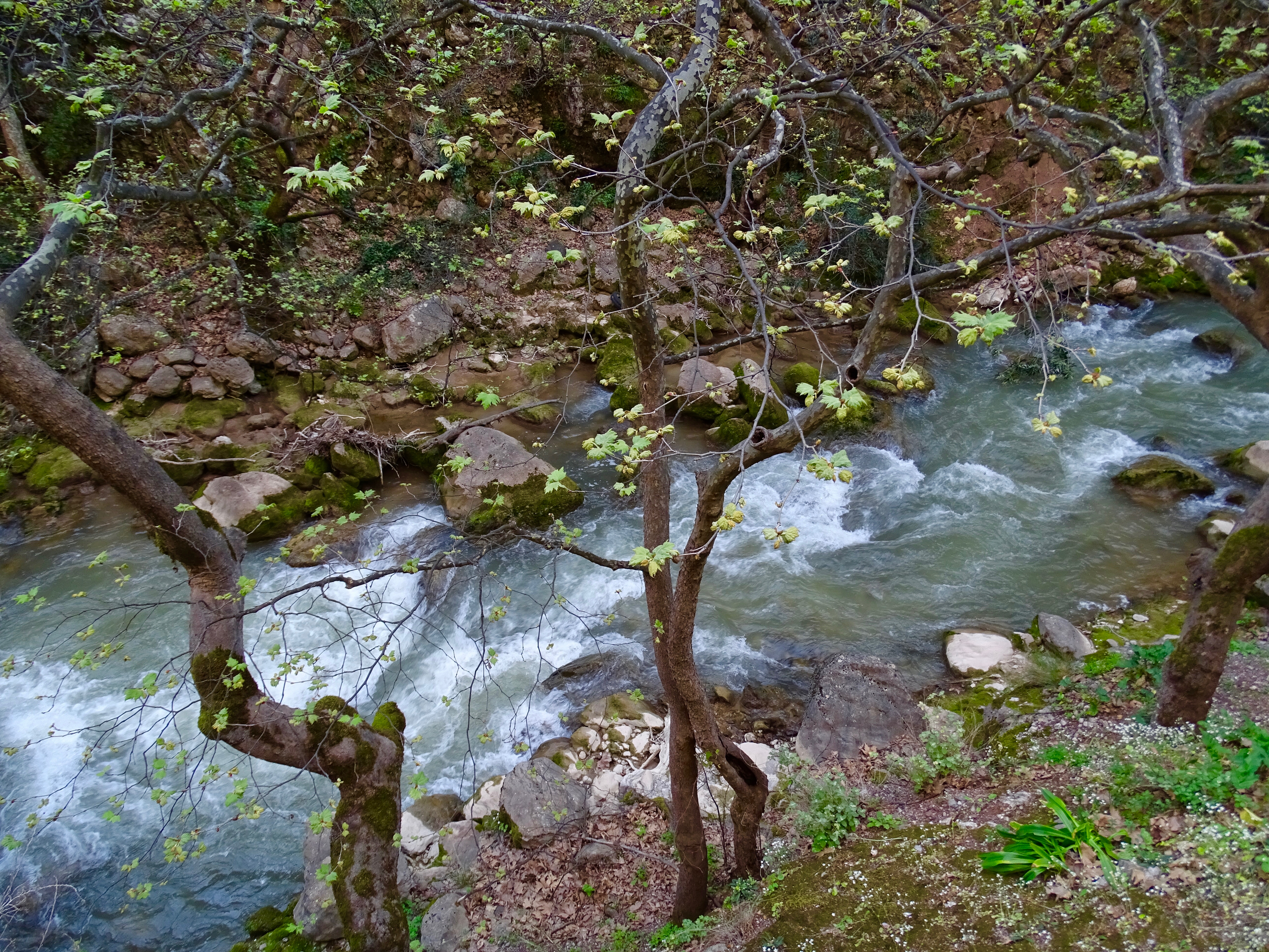 Φαράγγι Boυραϊκού 2017 This is a photography of Natura 2000 protected area with ID GR2320003